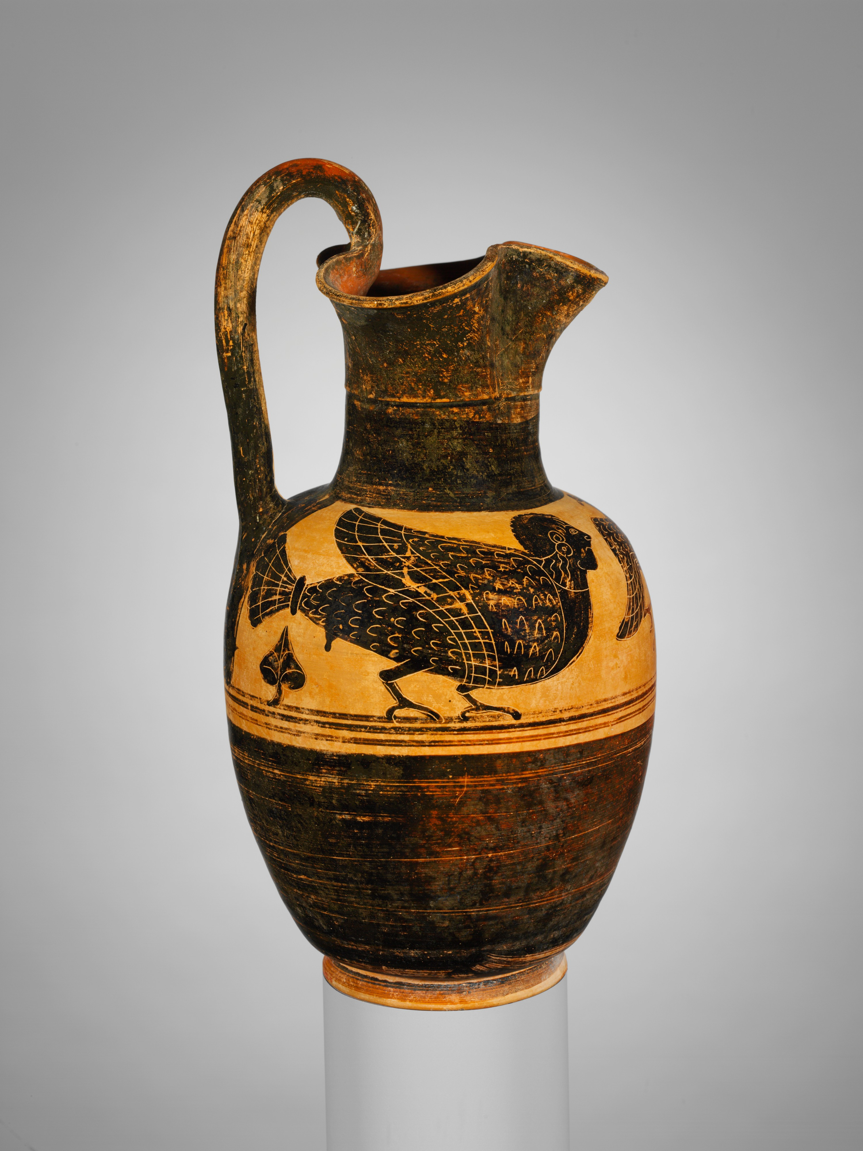 Etruscan; Oinochoe; Vases